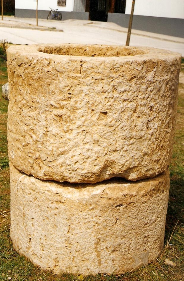 Restos del pozo romano de San Román